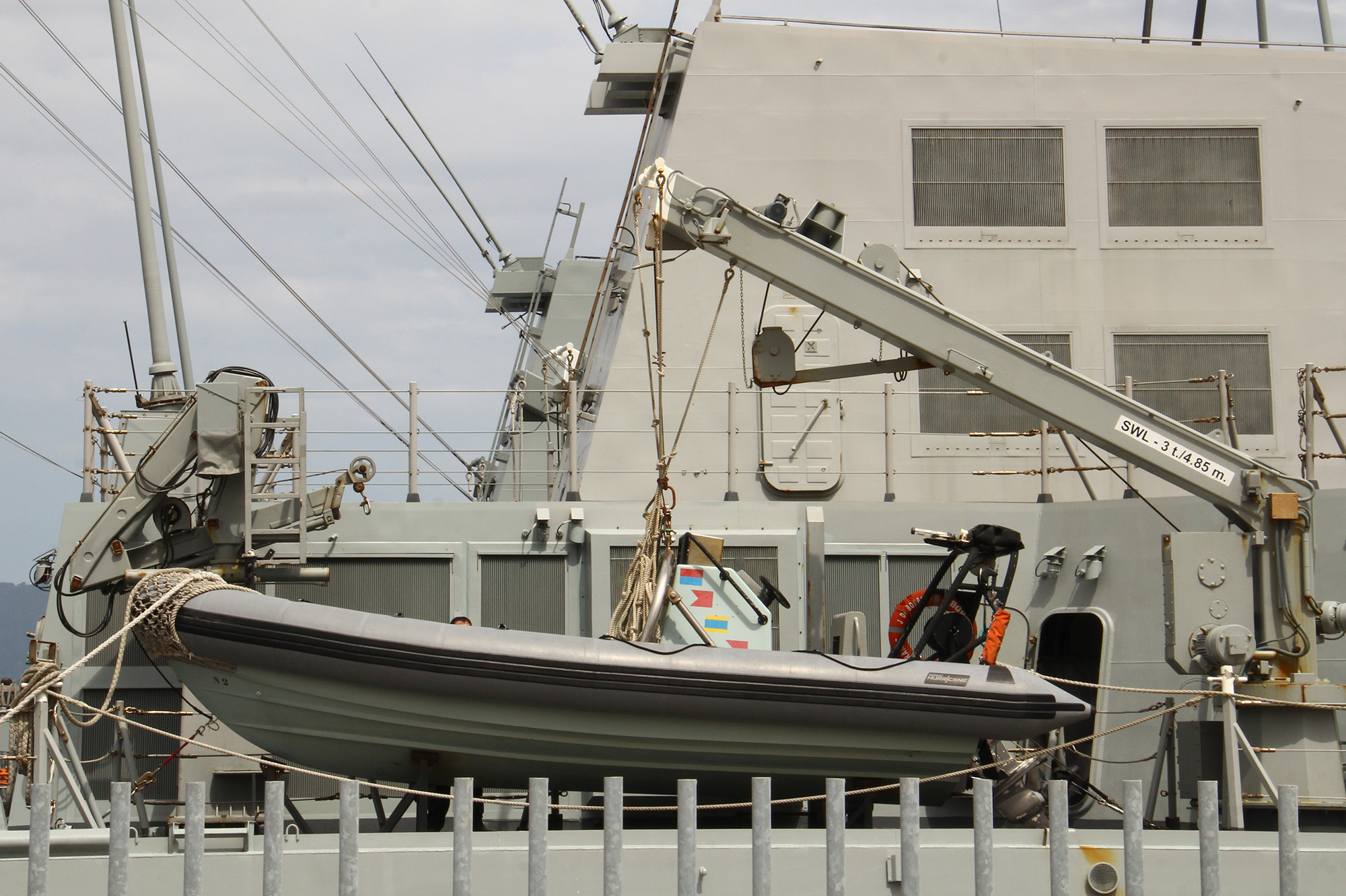 Visita a Vigo de las fragatas "Álvaro de Bazán" F-101 y "Almirante Juan de Borbón" F-102 de la Armada Española, ambas de la clase "Álvaro de Bazán" (también conocida como F-100), el 27 y 28 de mayo de 2017. Frigates F-100 in Vigo Visit to Vigo of the frigates "Álvaro de Bazán" F-101 and "Admirante Juan de Borbón" F-102 of the Spanish Navy, both of the class "Álvaro de Bazán" (also known as F-100), May 27 and 28, 2017.